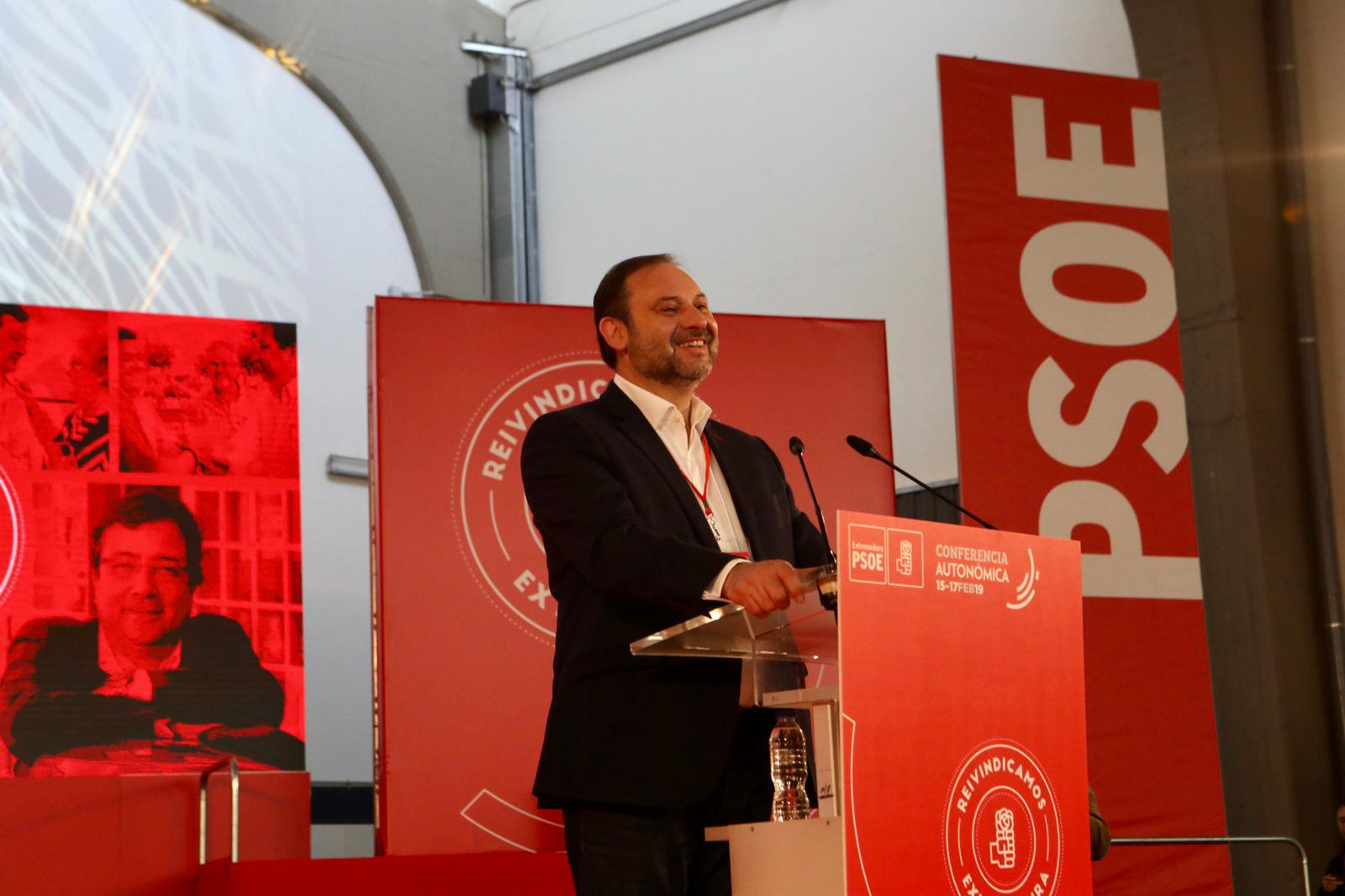 Inauguración Conferencia Autonómica en Mérida